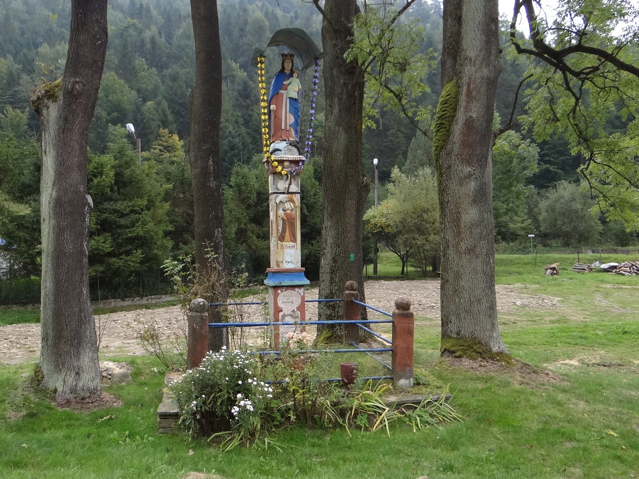 Figurka przydrożna w Kocierzu Moszczanickim